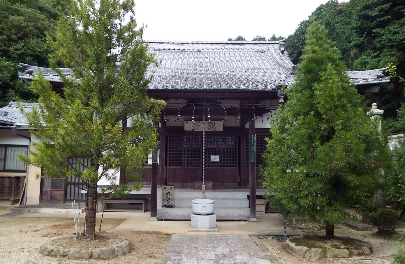 蓮生寺の本堂